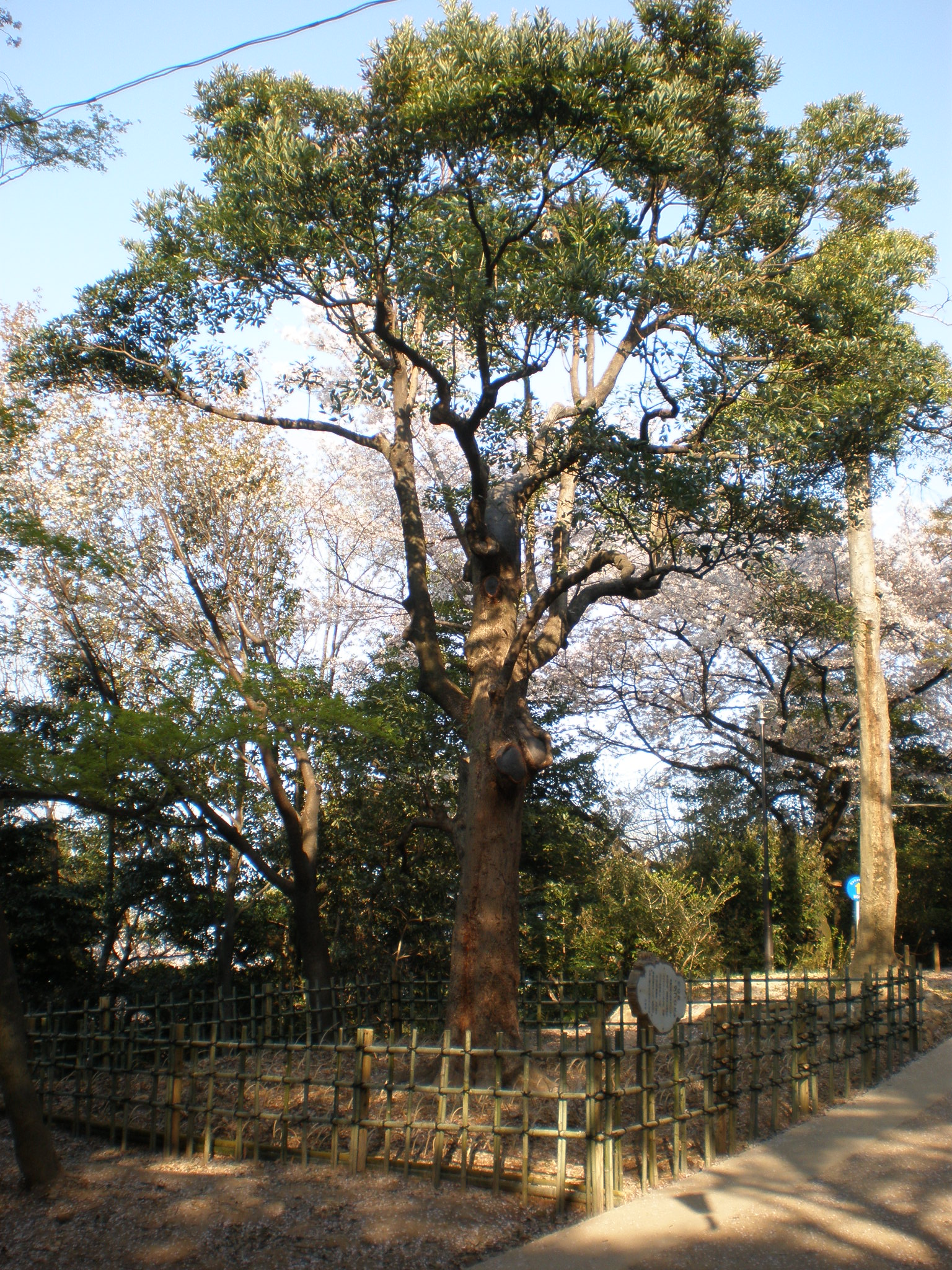 愛知県小牧市の小牧山にあるタブノキ